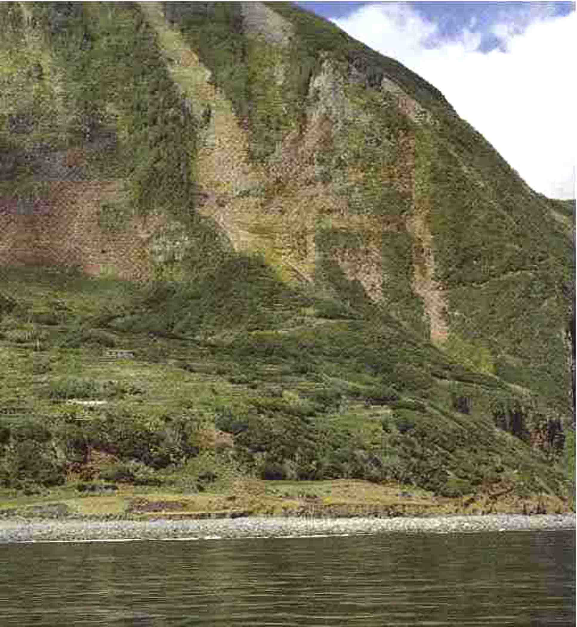 Fajã Sanguinhal, ilha de São Jorge, Açores, Portugal.